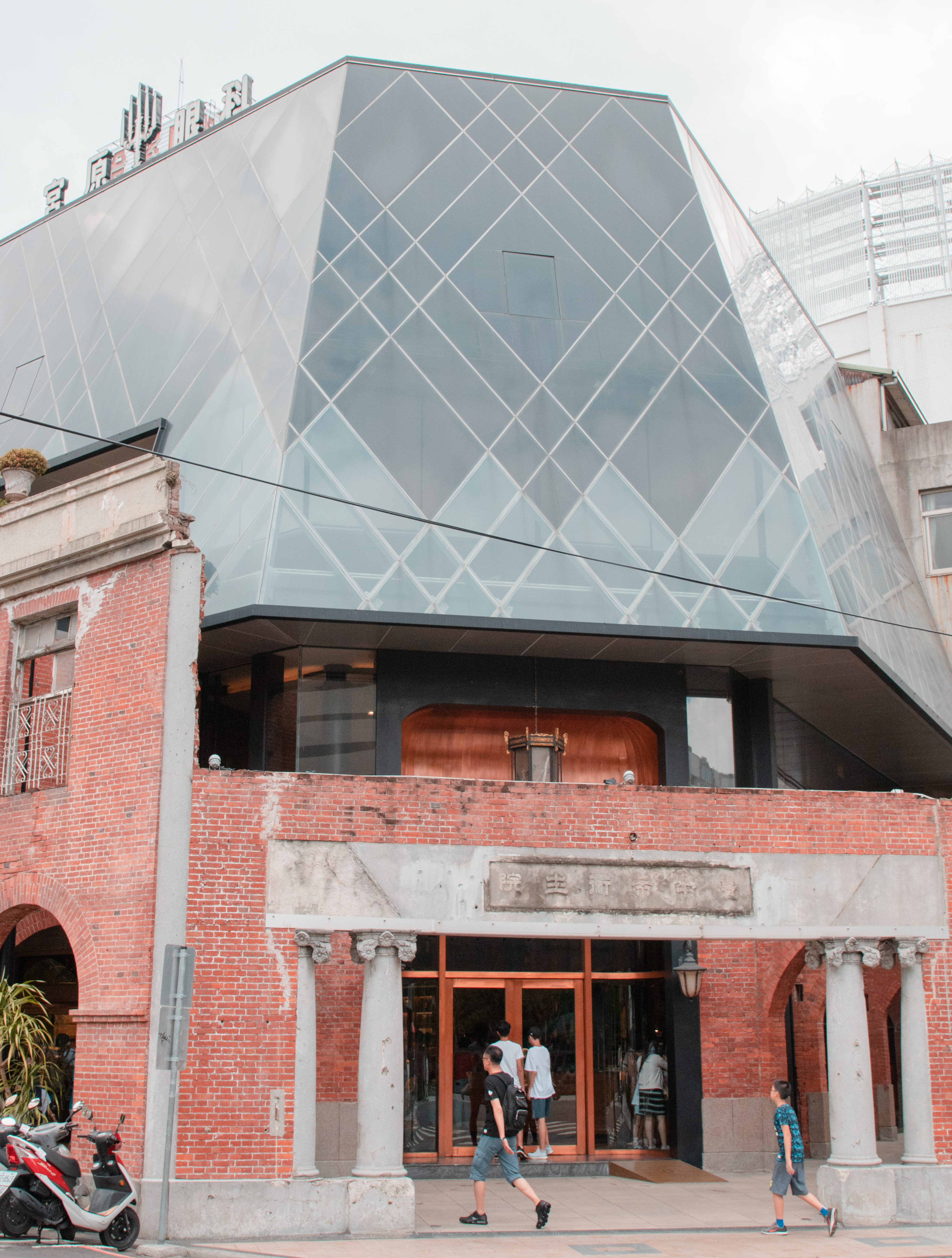 日出宮原眼科門市。